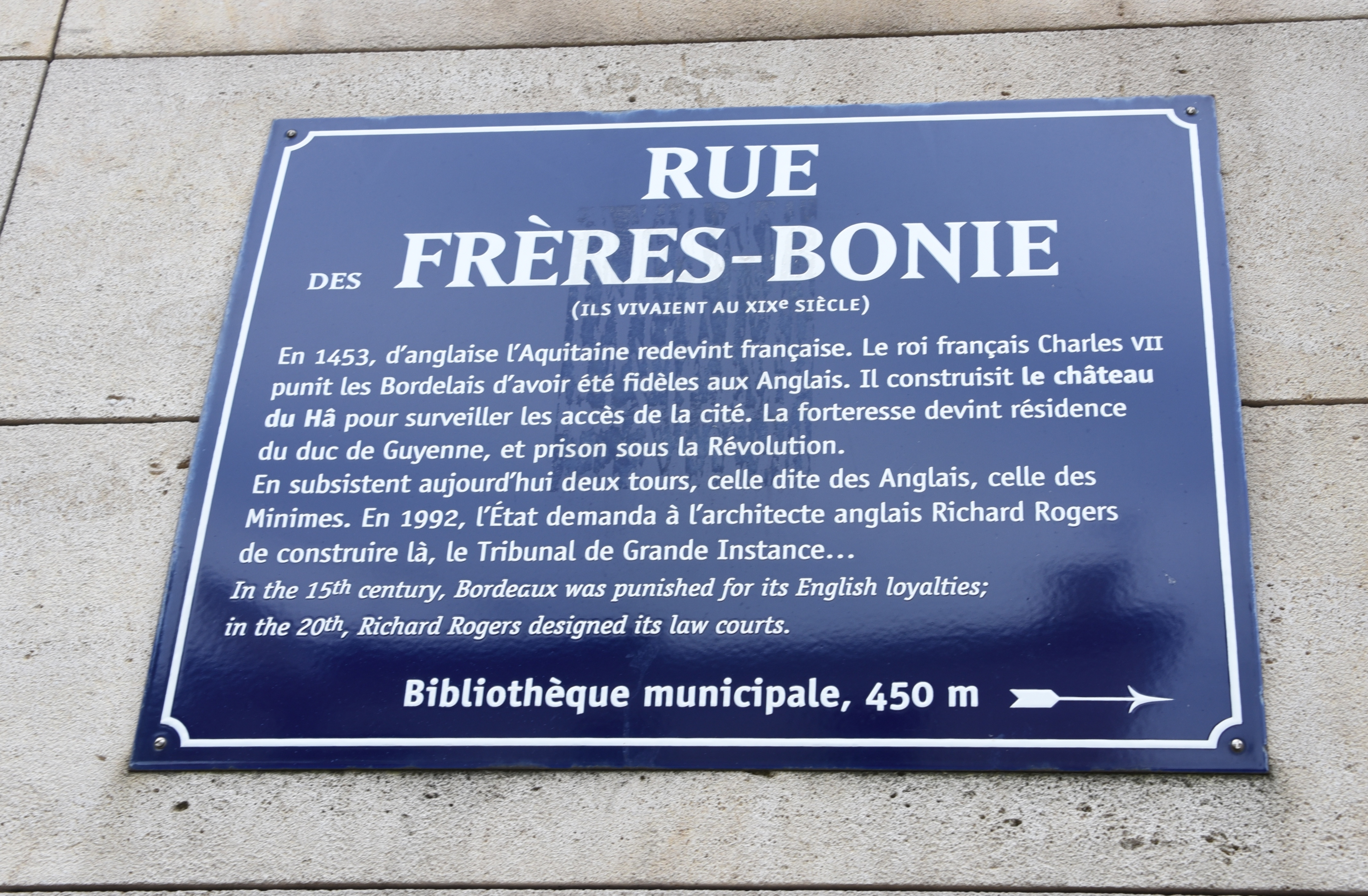 Rue des Freres-Bonie